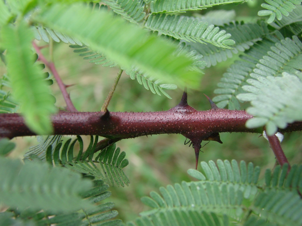 Mimosa tenuiflora (Wild.) Poir. - FABACEAE - BR 242 - Cristópolis - Bahia - Brasil.